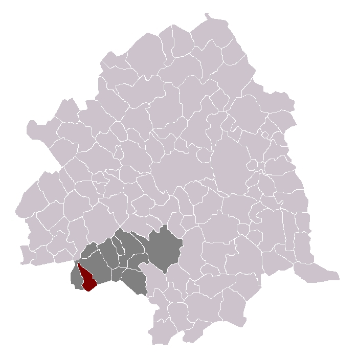 Provin dans son canton et son arrondissement